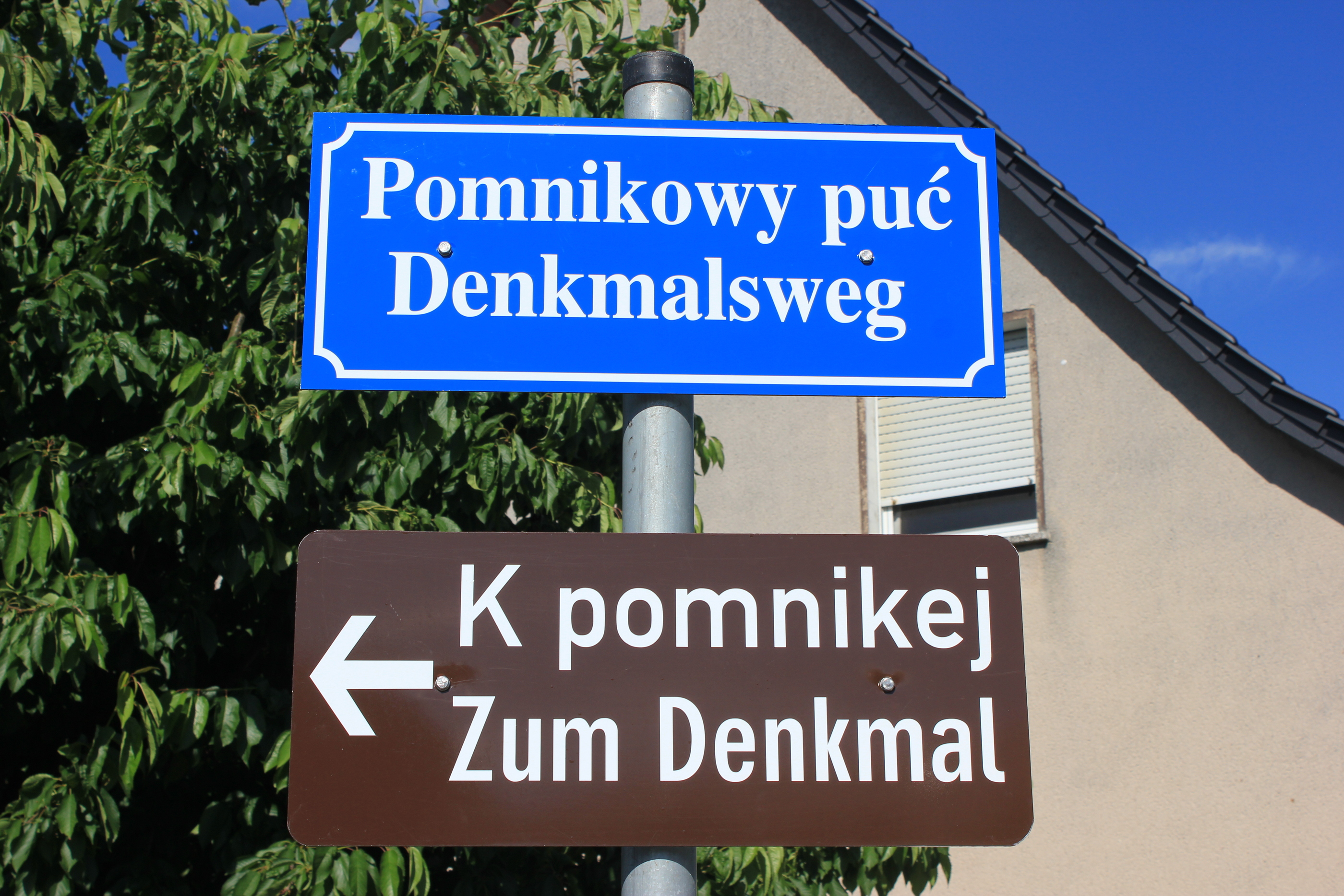 Hornjoserbsce: Dwurěčnej serbsko-němskej značce při Pomnikowym puću w Chrósćicach.